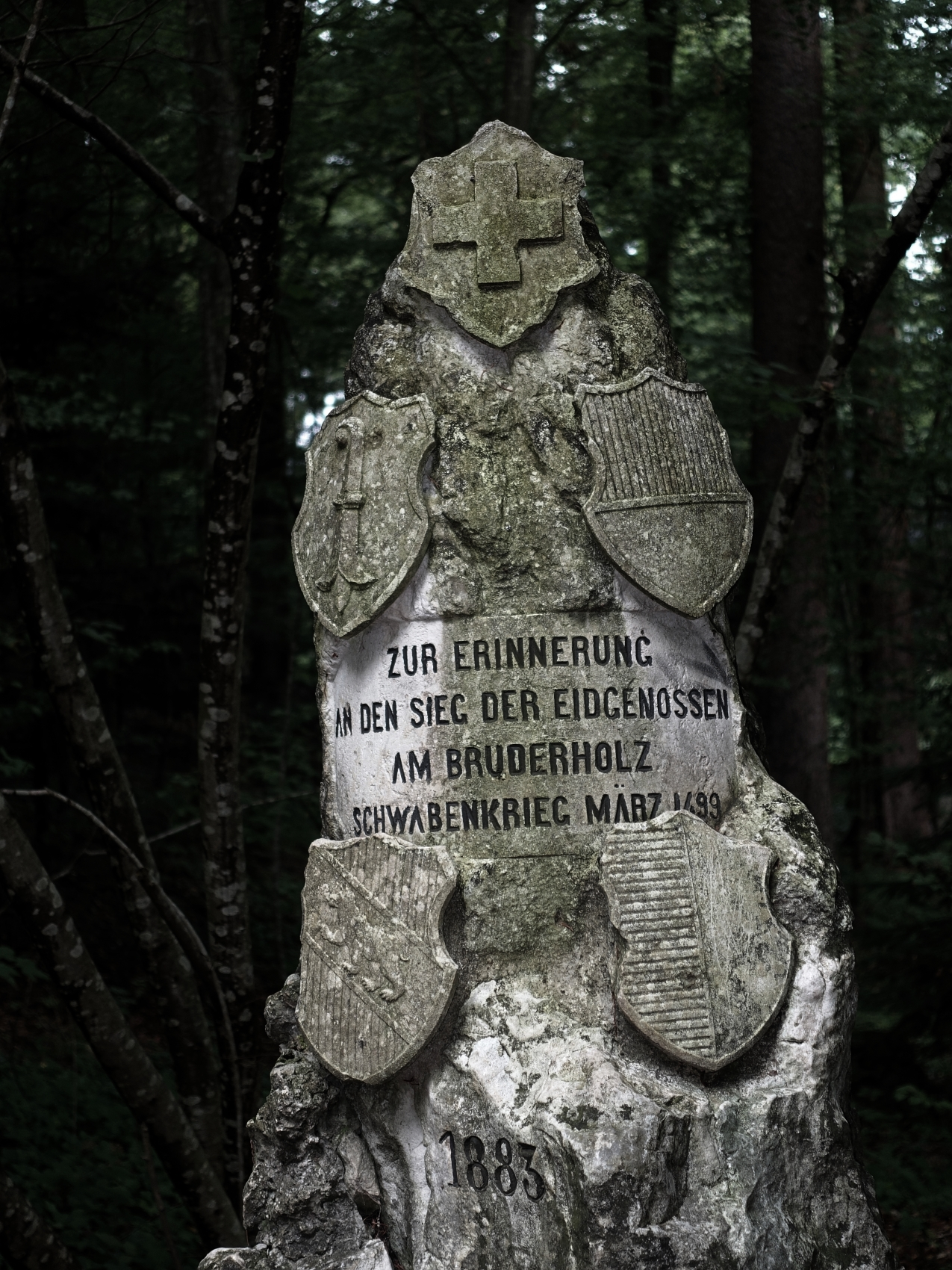 Gefecht am Bruderholz, 22. März 1499, Bruderholz Denkmal im Reinacher Wald, Standort, Hohle Gasse-Spitzenhägiweg